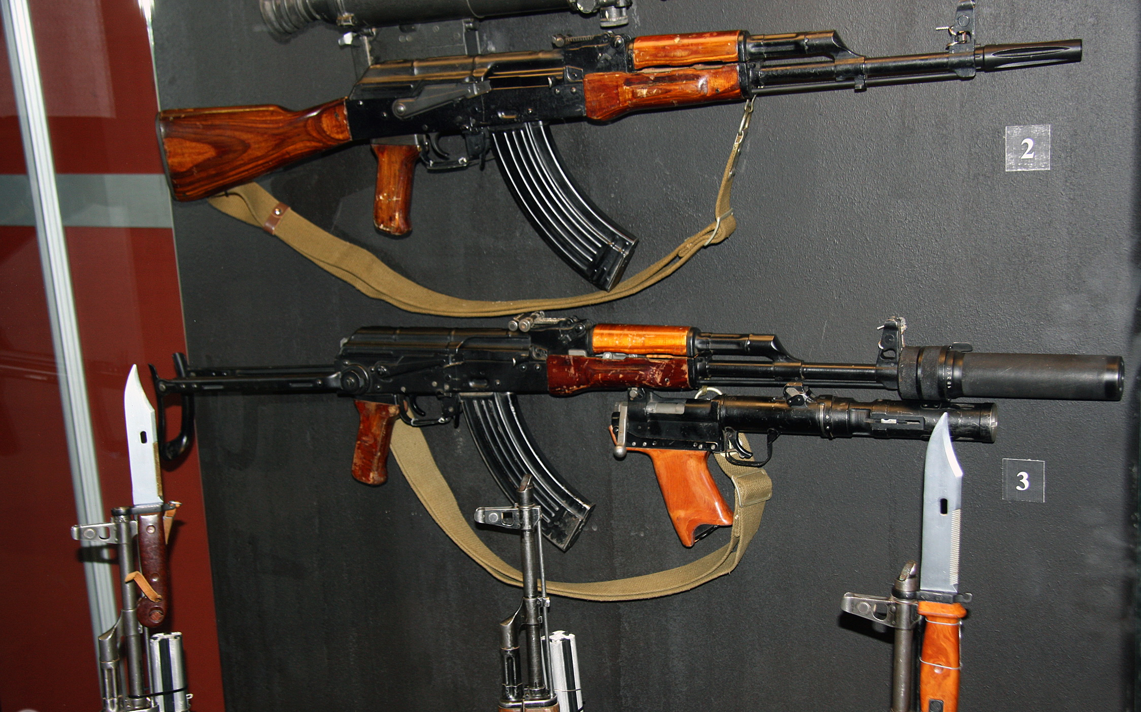 Автоматно-гранатомётный комплекс «Тишина» на базе АКМ.